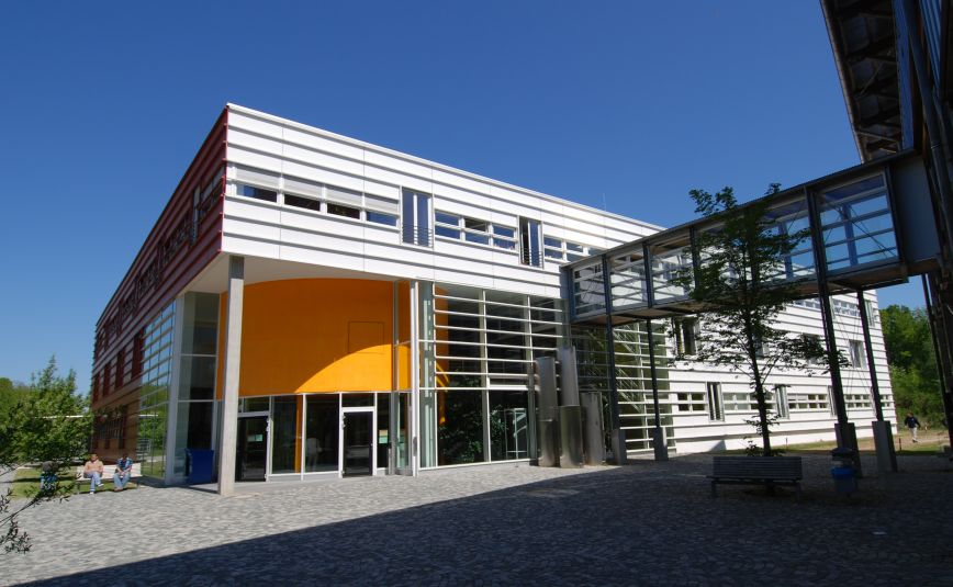 Die Bibliotheks-Zentrale des Kommunikations- und Informationszentrums (kiz) der Universität Ulm